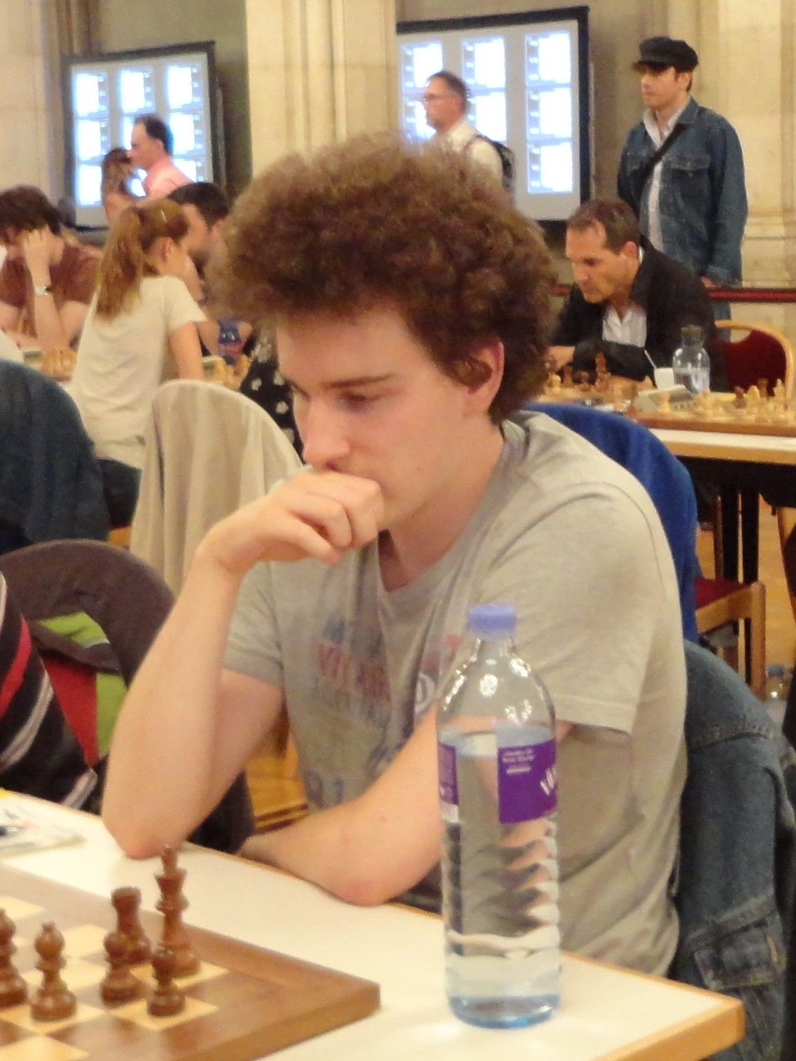 Léon Mons, Vienna Chess Open 2015 in Wien.